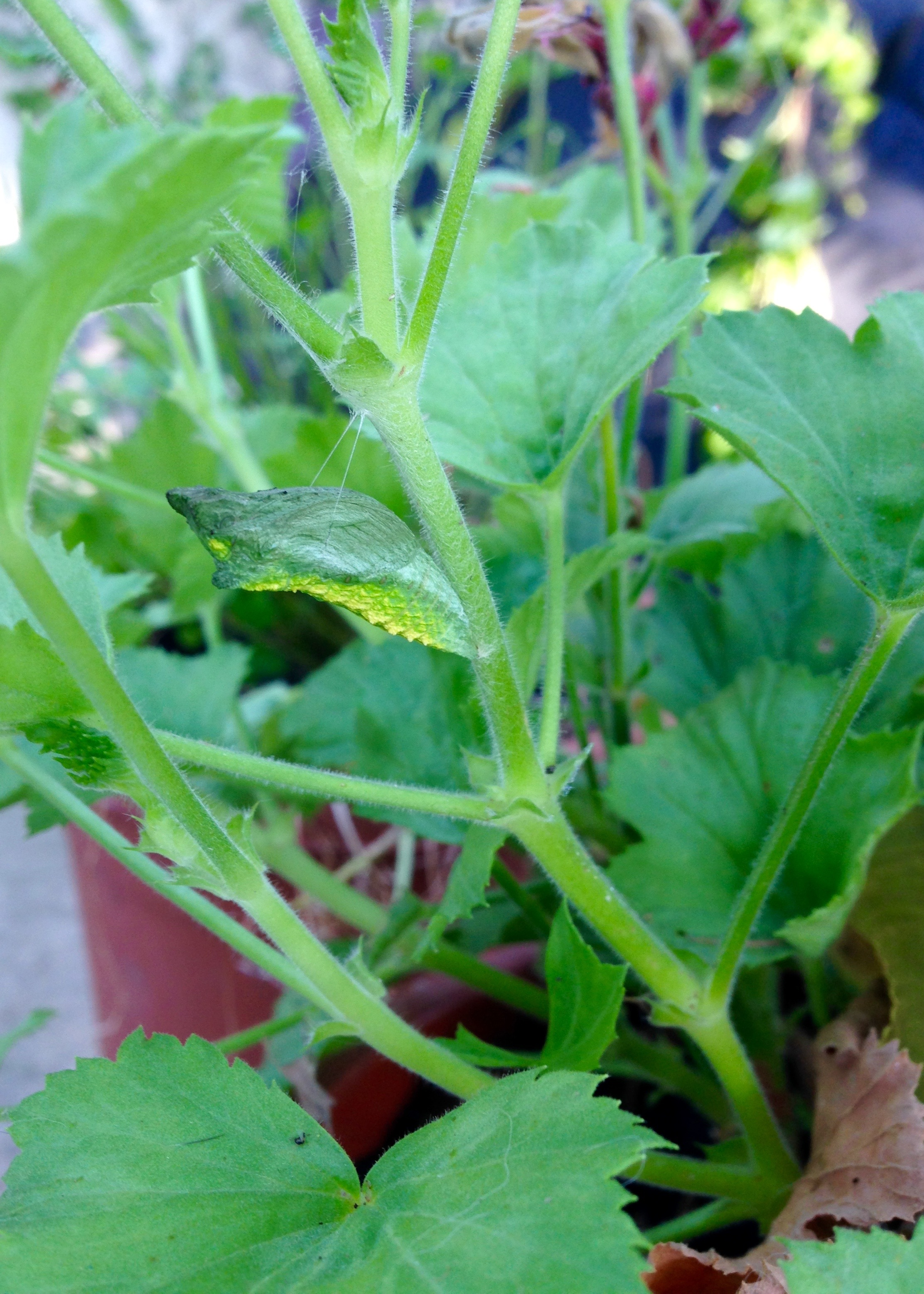 La chenille s'immobilise sur une tige rigide.